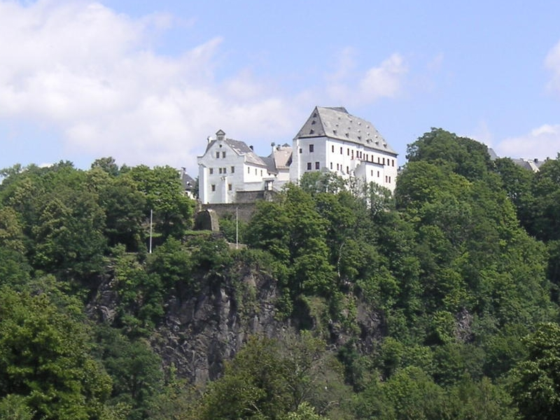 Schloss Wolkenstein im Erzgebirge von Südwest